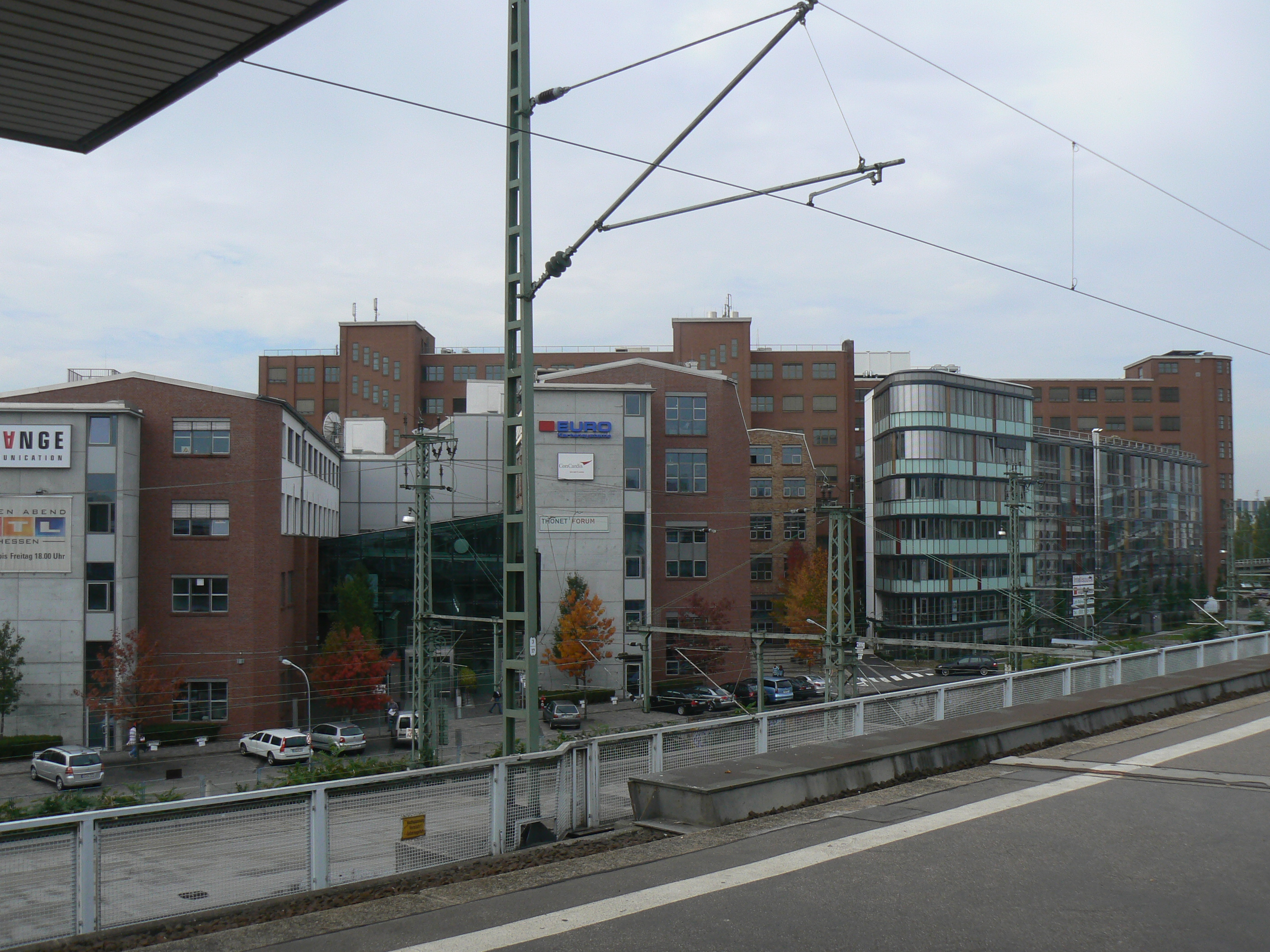 ehemaliges Betriebsgelände der FMA Frankfurter Maschinenbau AG vormals Pokorny & Wittekind, nachmalig Demag, Solmsstraße 2-26. Nach Produktionsortverlsgerung wurde das ehemalige Betriebsgelände kernsaniert und an diverse gewerbliche Mieter vermietet. Heute ist hier kein gewerblicher Produktionsort mehr. Blick vom Bahnhof Frankfurt-West auf das bebaute Gelände.